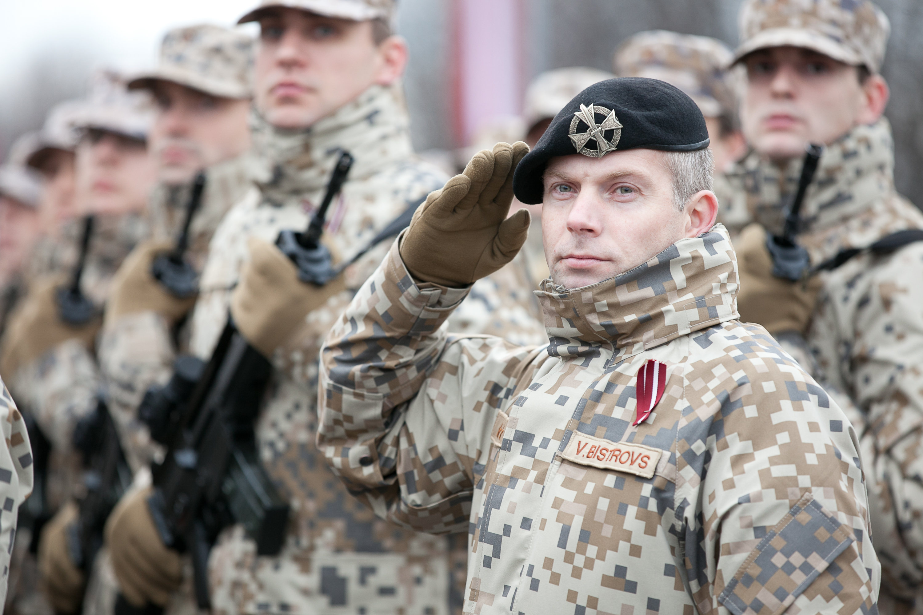 2011.gada 18.novembris. 11.novembra krastmalā notiek svinīgā Nacionālo Bruņoto spēku parāde. Foto: Ernests Dinka, Saeimas Kanceleja